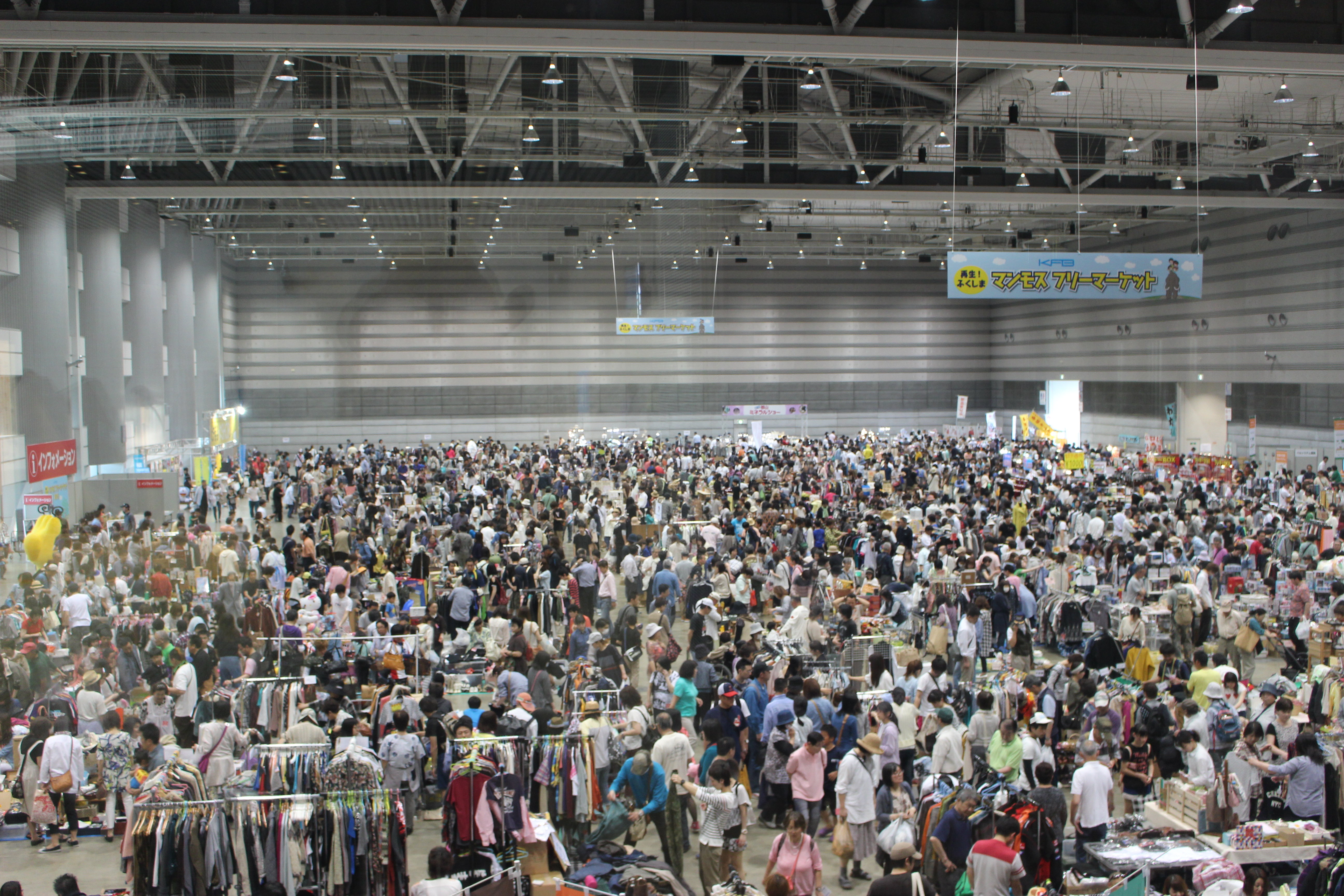 KFBマンモスフリーマーケット会場（ビッグパレットふくしま）